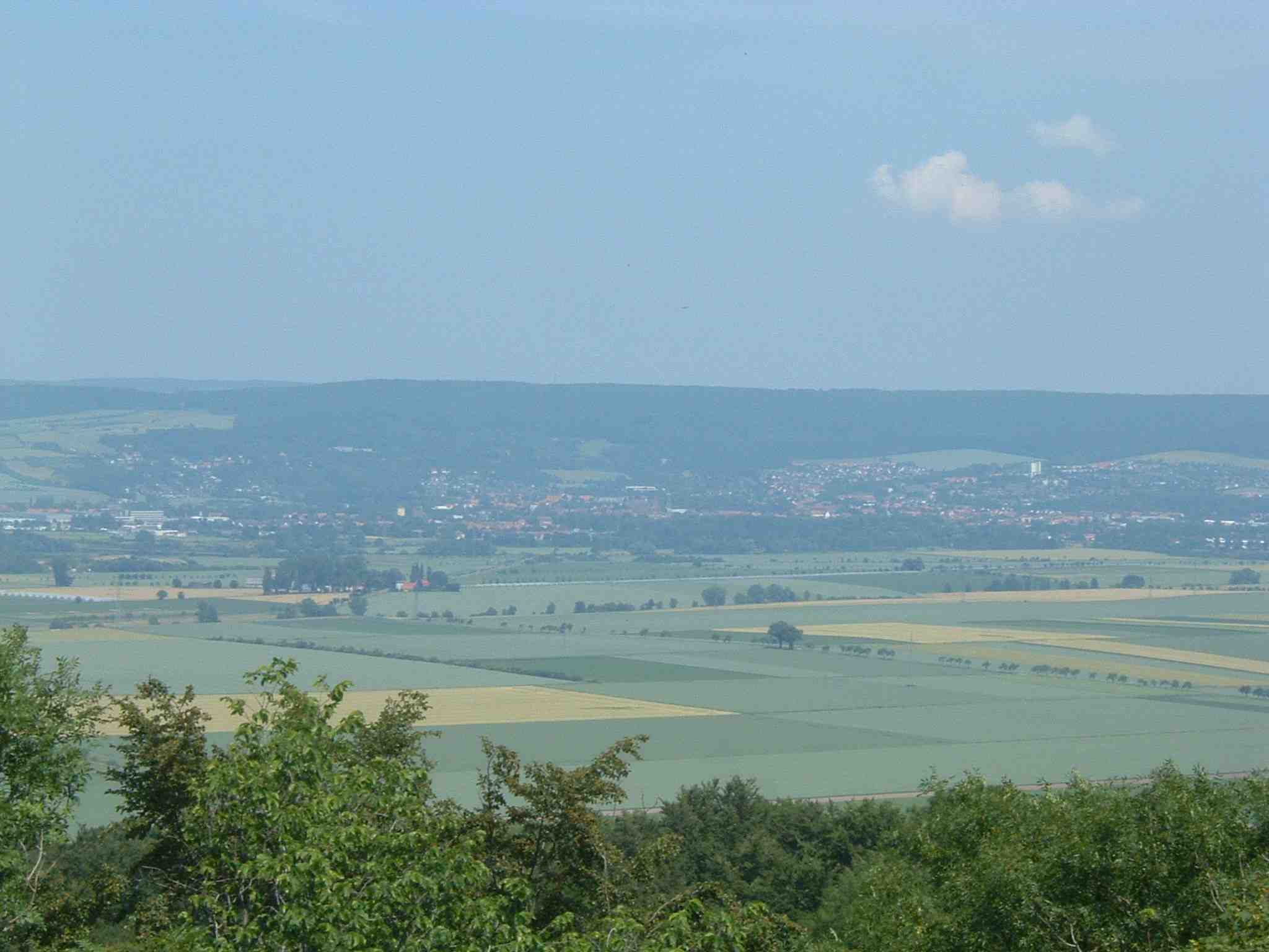 Grubenhagen Castle near Einbeck, Germany